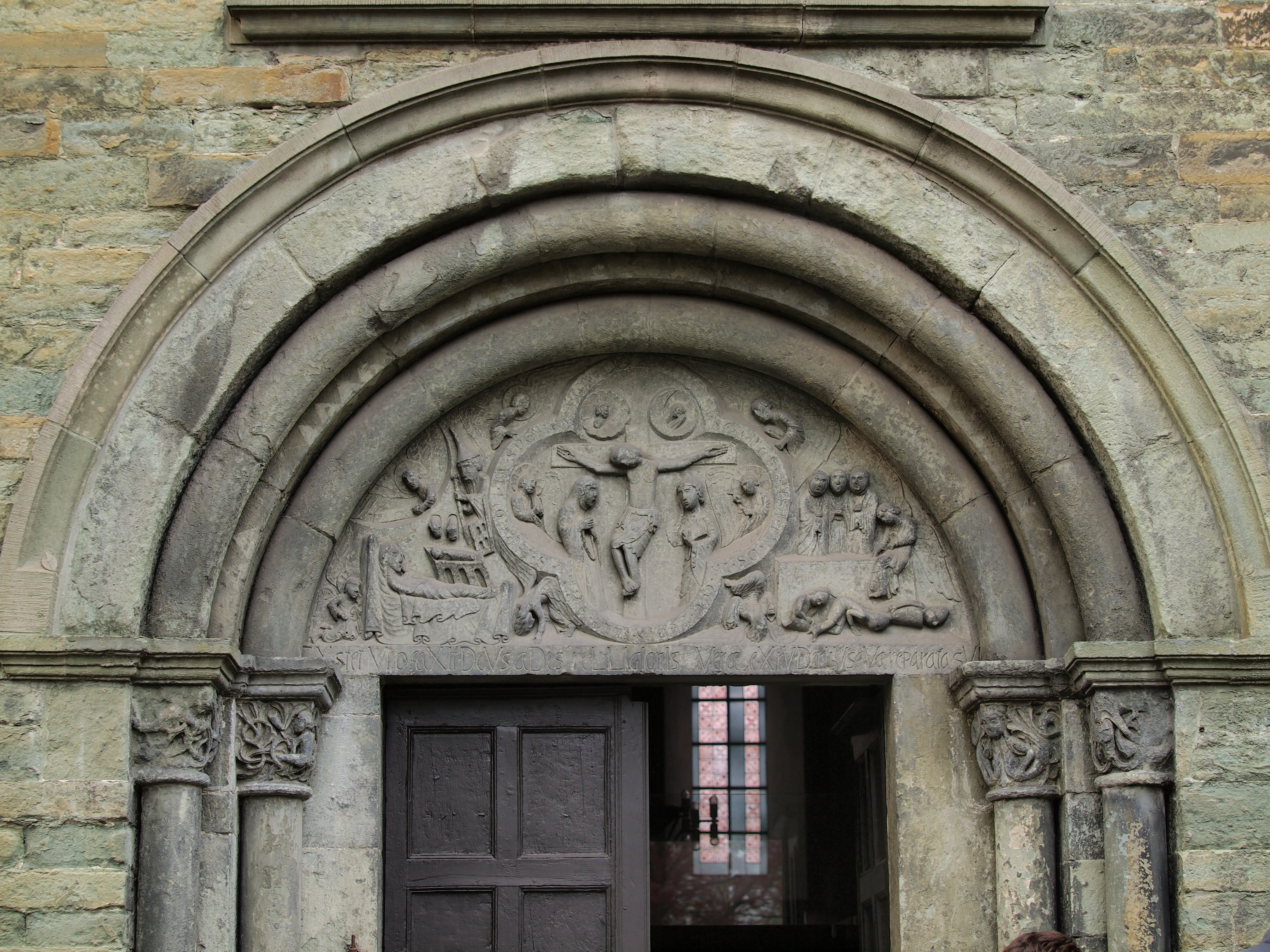 Maria zur Höhe in Soest, Am Honekirchhof 2, Denkmal, Eingang mit Tympanon, fotografiert anlässlich des 30. Wikipediastammtisches Sauerland